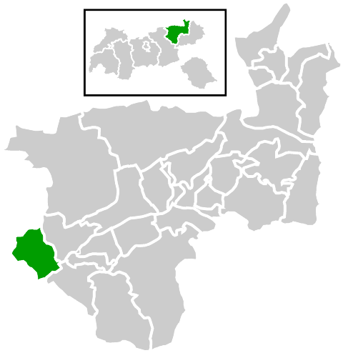 Lage der Gemeinde innerhalb des Bezirks Kufstein